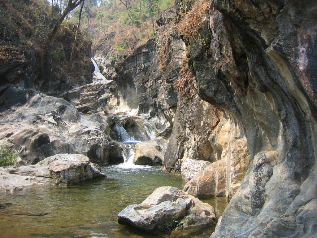 Lan Sang National Park, Lan Sang Waterfall (Dry Season, Trockenzeit), Thailand, Foto von Martin Püschel, Februar 2002